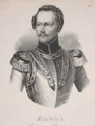 Friedrich Wilhelm Ludwig Prinz von Preußen (1794-1863)